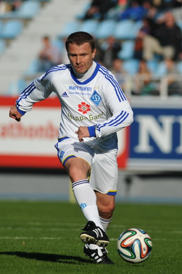 Матч пам'яті Белькевича, Баля і Гусіна